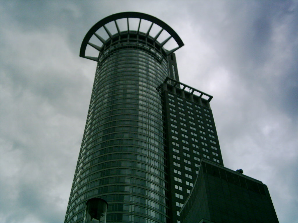 Westendtower, Kronenhochhaus